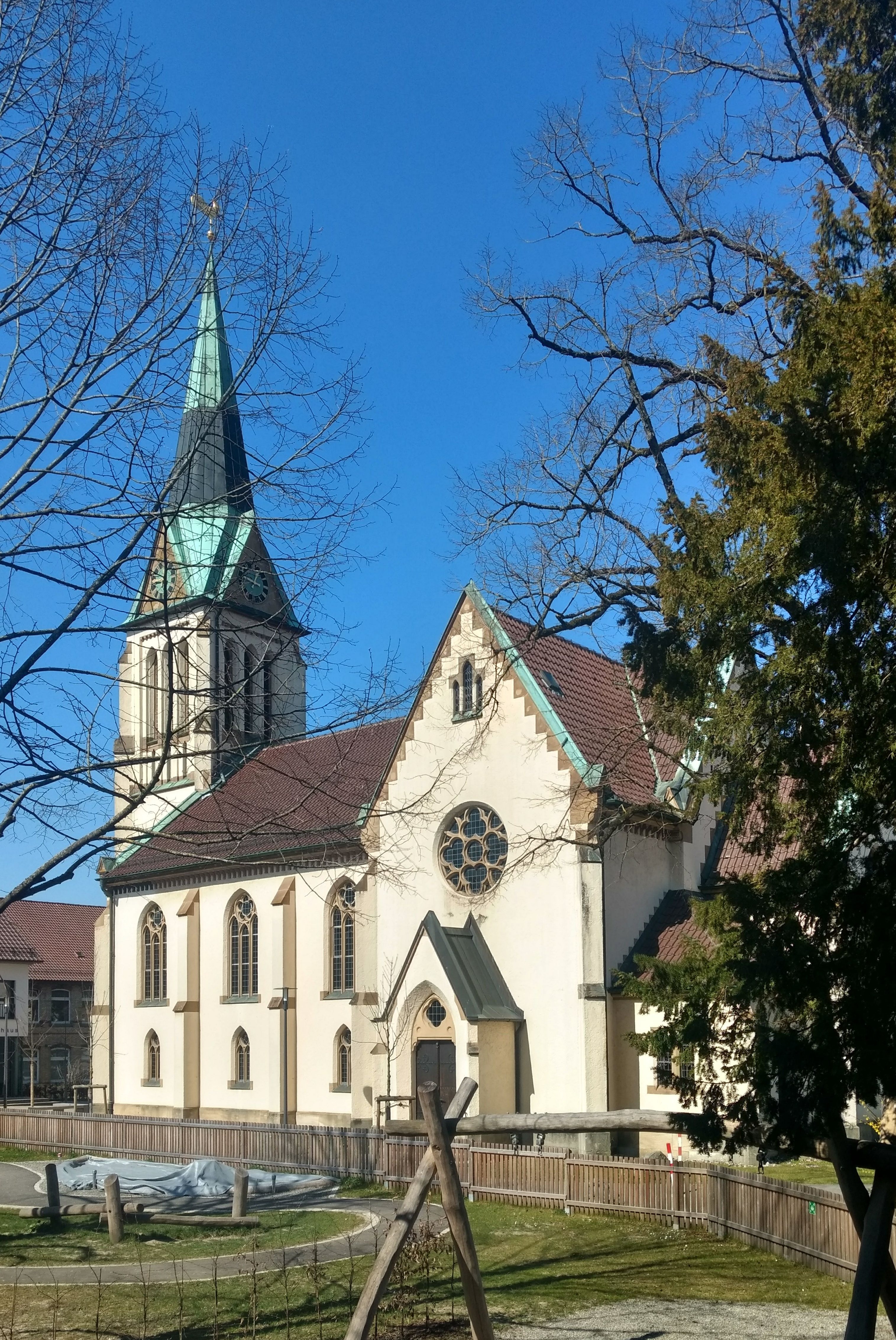 Evangelische Stadtkirche in 88250 Weingarten, von Südosten (Gartenstraße) gesehen